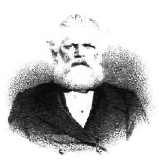 Griechischer Gelehrter, 19. Jahrhundert